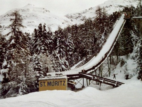 Olympiaschanze in St. Moritz